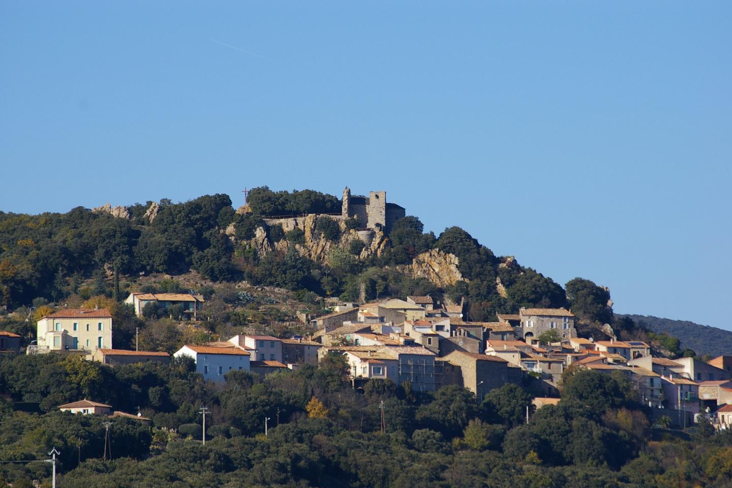 Roquessels & Château, Hérault, France